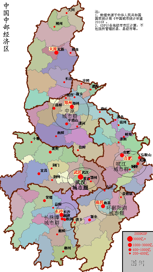 该图片反映中国中部经济区城市发展情况，由本人绘制于2012年4月21日，参考书目为国家统计局《中国城市统计年鉴2010》以及各省统计局发布的统计年鉴。